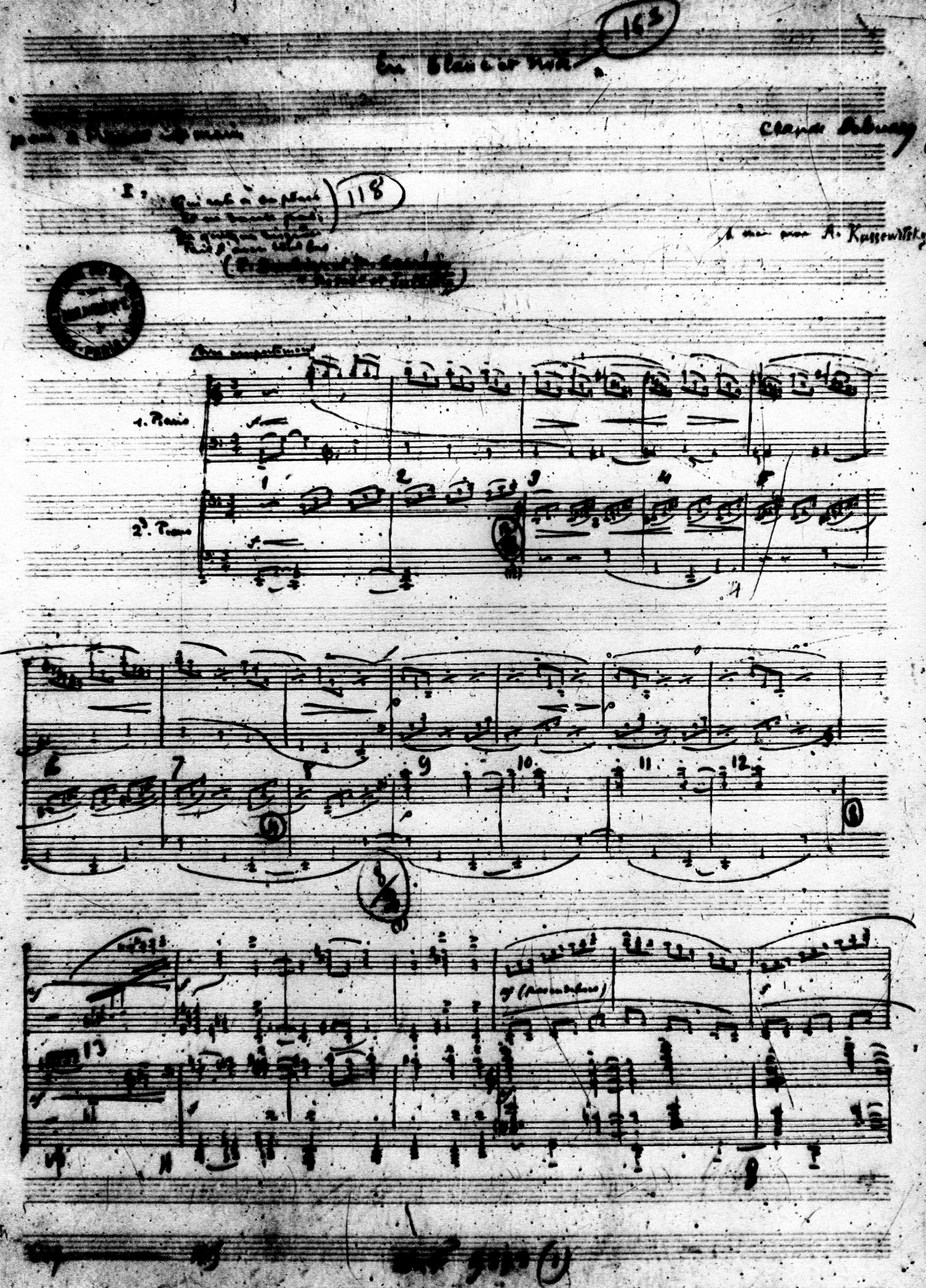 En blanc et noir, manuscrit du premier mouvement